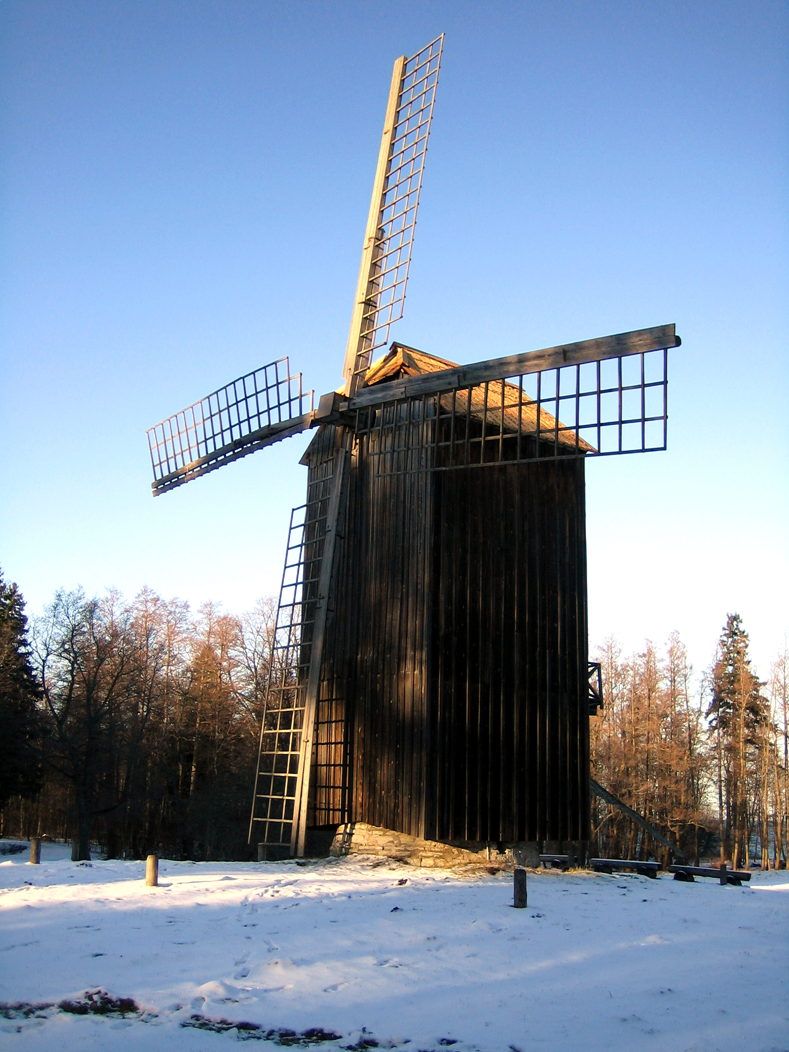 Nätsi tuulik Eesti Vabaõhumuuseumis. Kahekordne Läänemaa pukktuulik.